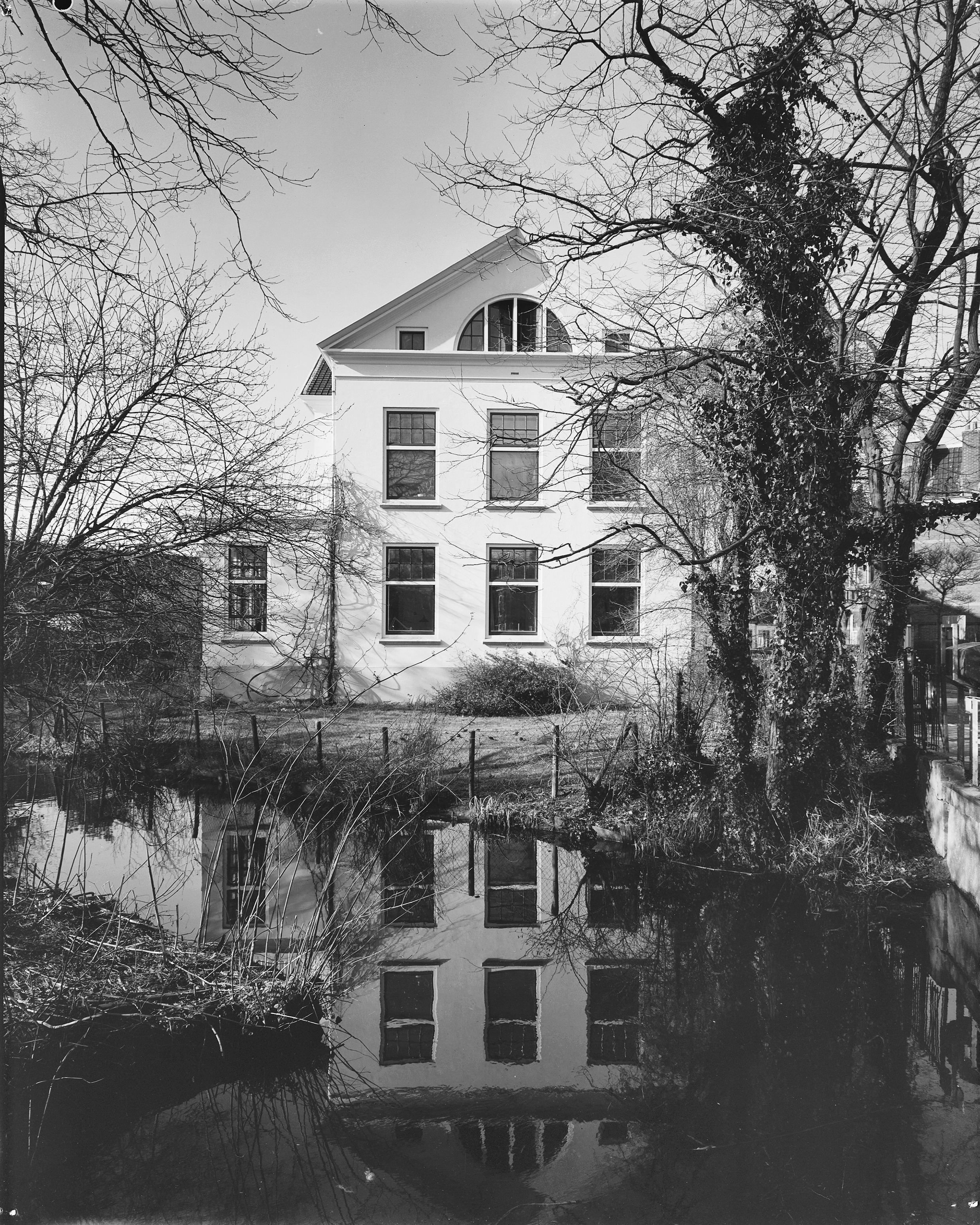 exterieur tuinzijde